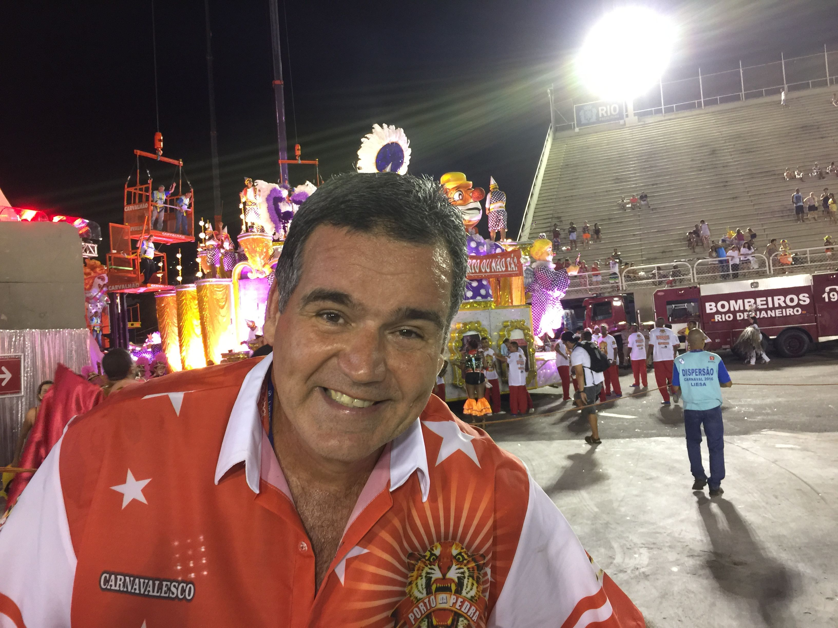 Rio de Janeiro - Carnavalesco Jaime Cezário feliz no fim do desfile, confiante de ter feito grande homenagem ao palhaço Carequinha (Cristina Indio do Brasil/Agência Brasil)